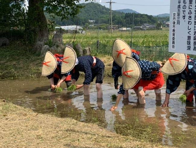 2019年5月の「月の輪田」の田植え。令和天皇の即位にあやかり、早乙女姿の女性達により行われた。